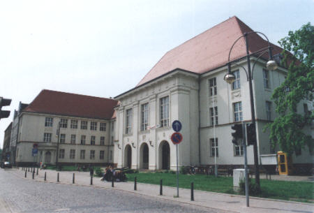 F. F. Runge Gymnasium Oranienburg, Deutschland.